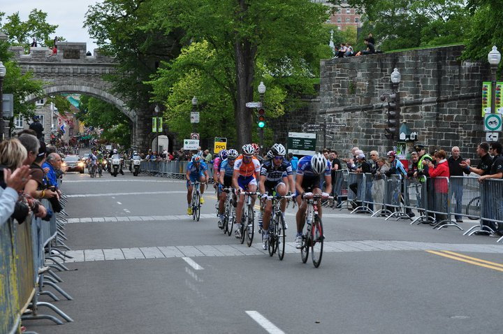 Les cyclistes du GPC de Québec à la porte Saint-Louis, Ville de Québec.